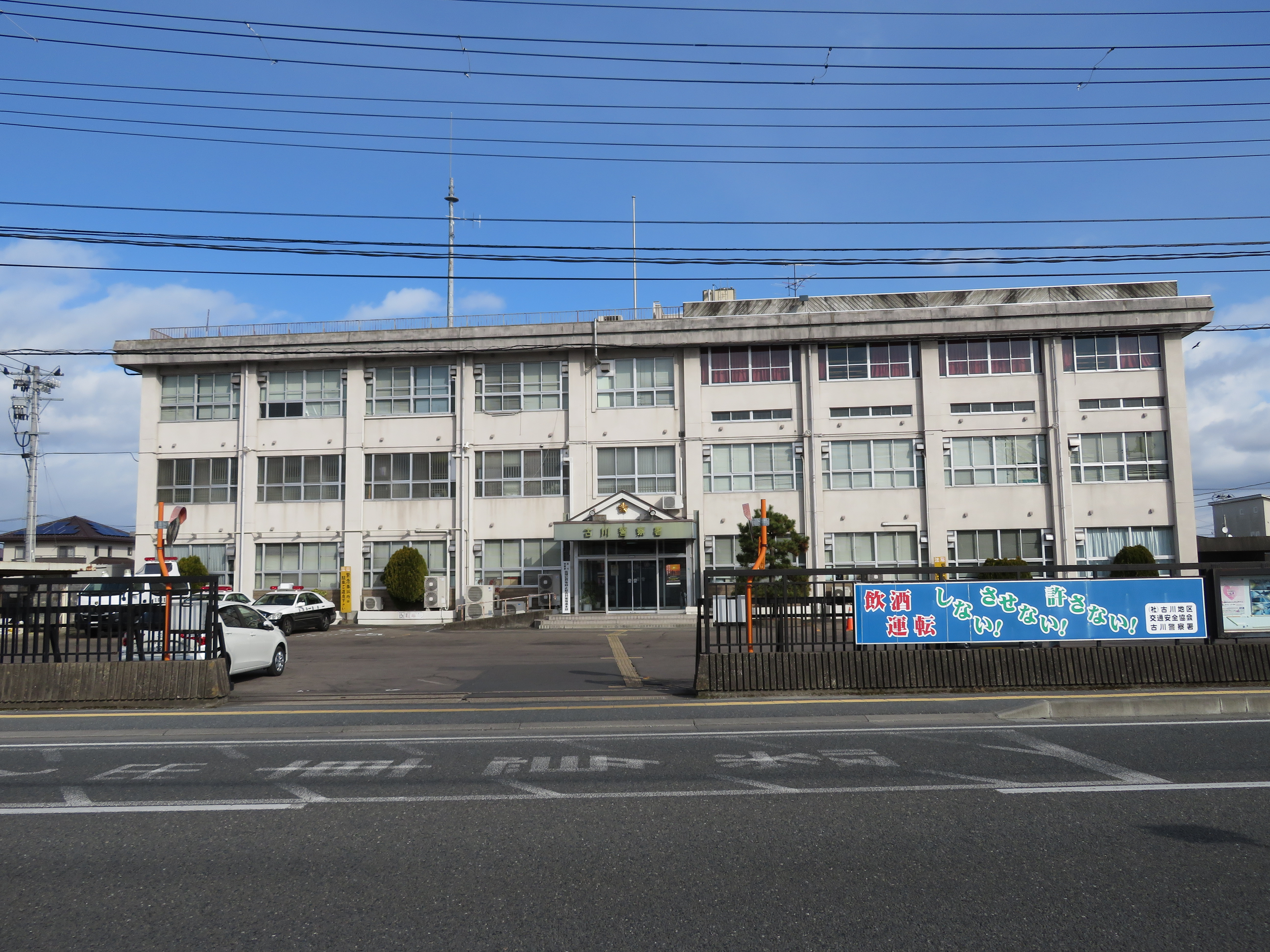 宮城県古川警察署庁舎